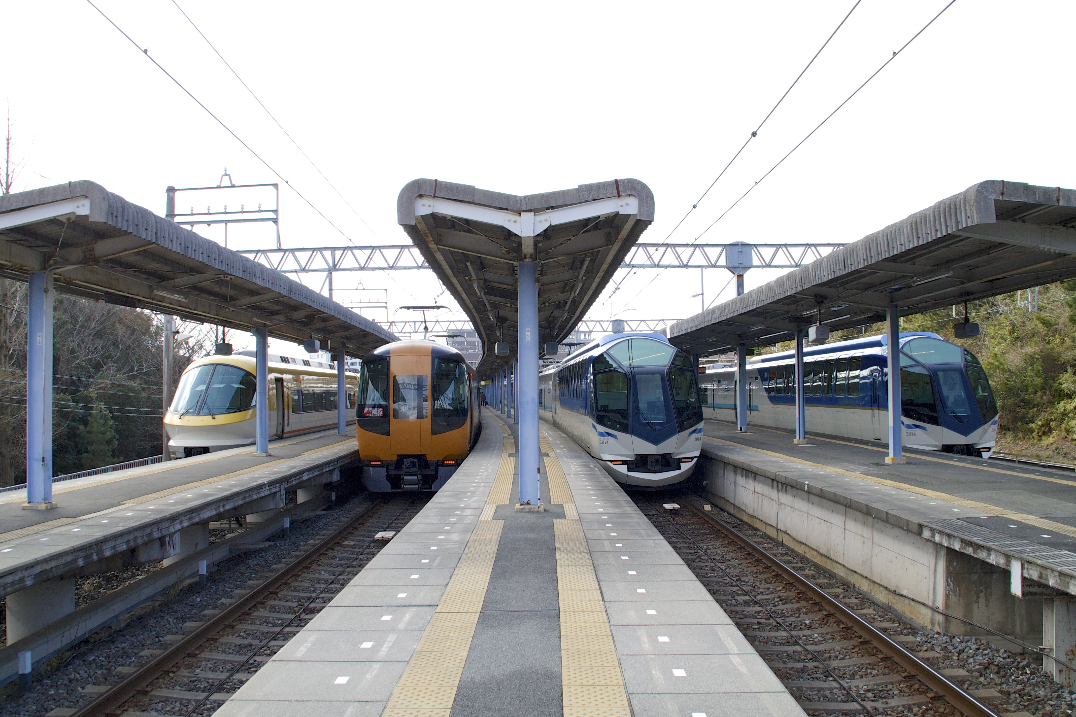 Kashikojima Station